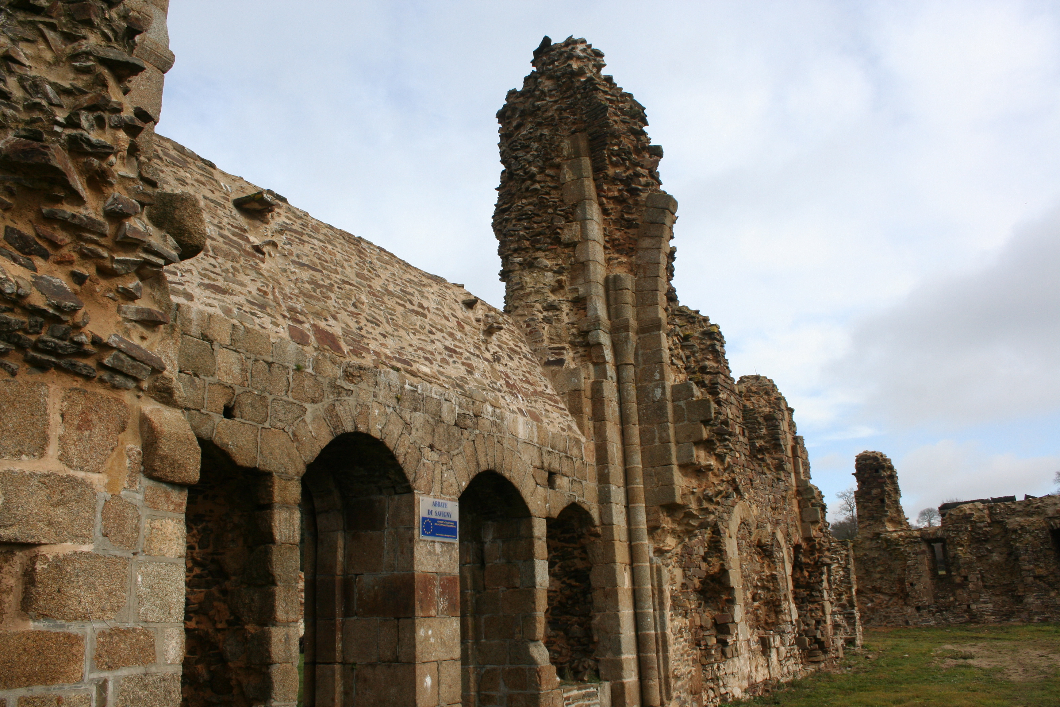 Porche menant dans le cloitre, vue depuis le réfectoire. Vue des ruines de l'abbaye de savigny le vieux, manche, france